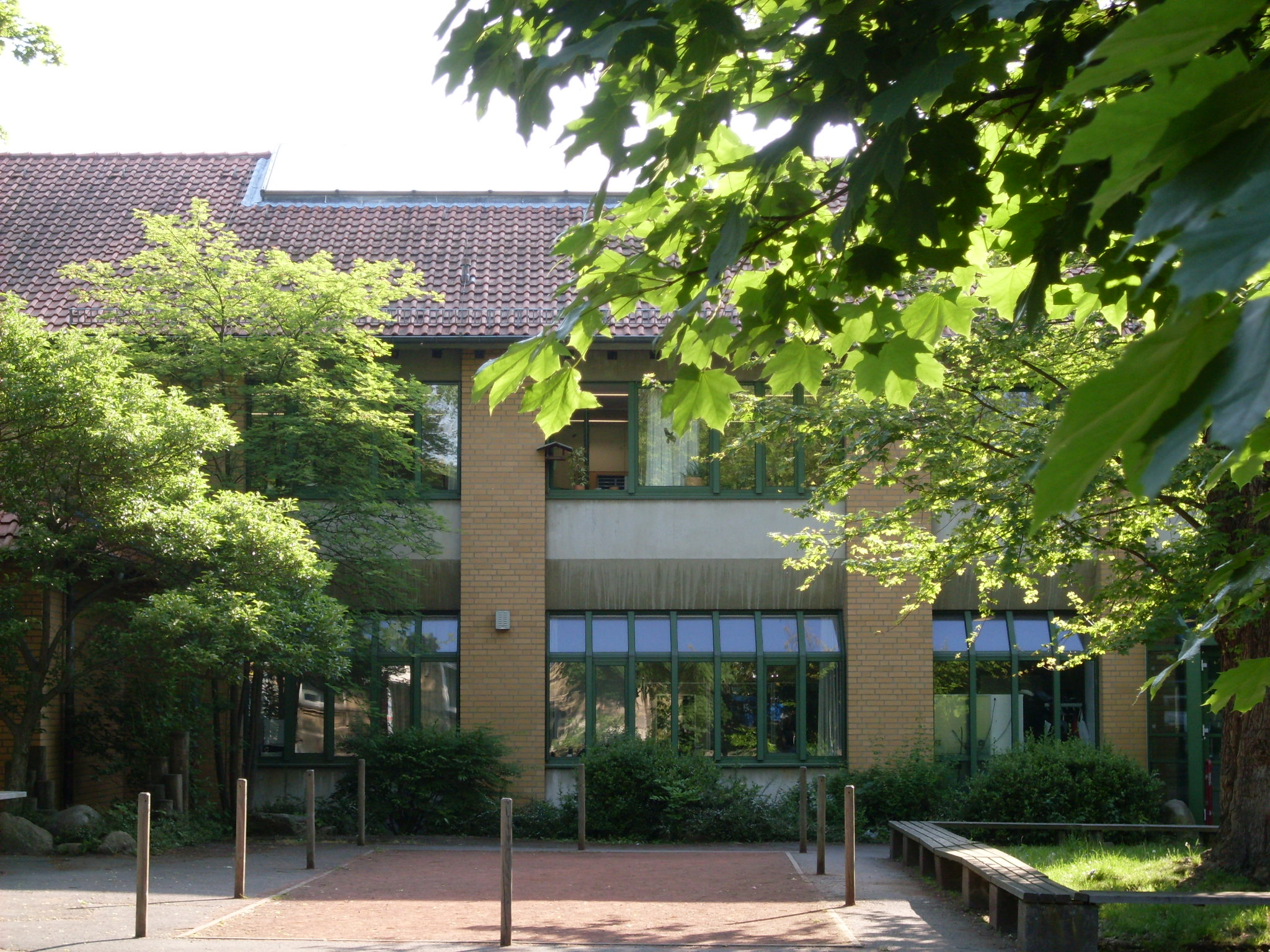 Frontansicht der Großen Schule Wolfenbüttel